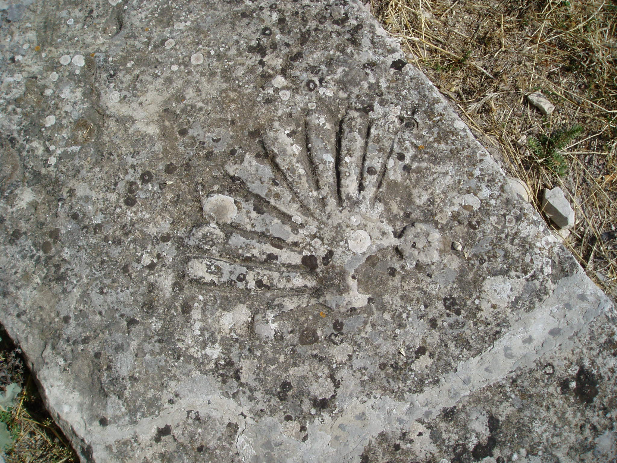 Arheološka zona Bribirska glavica